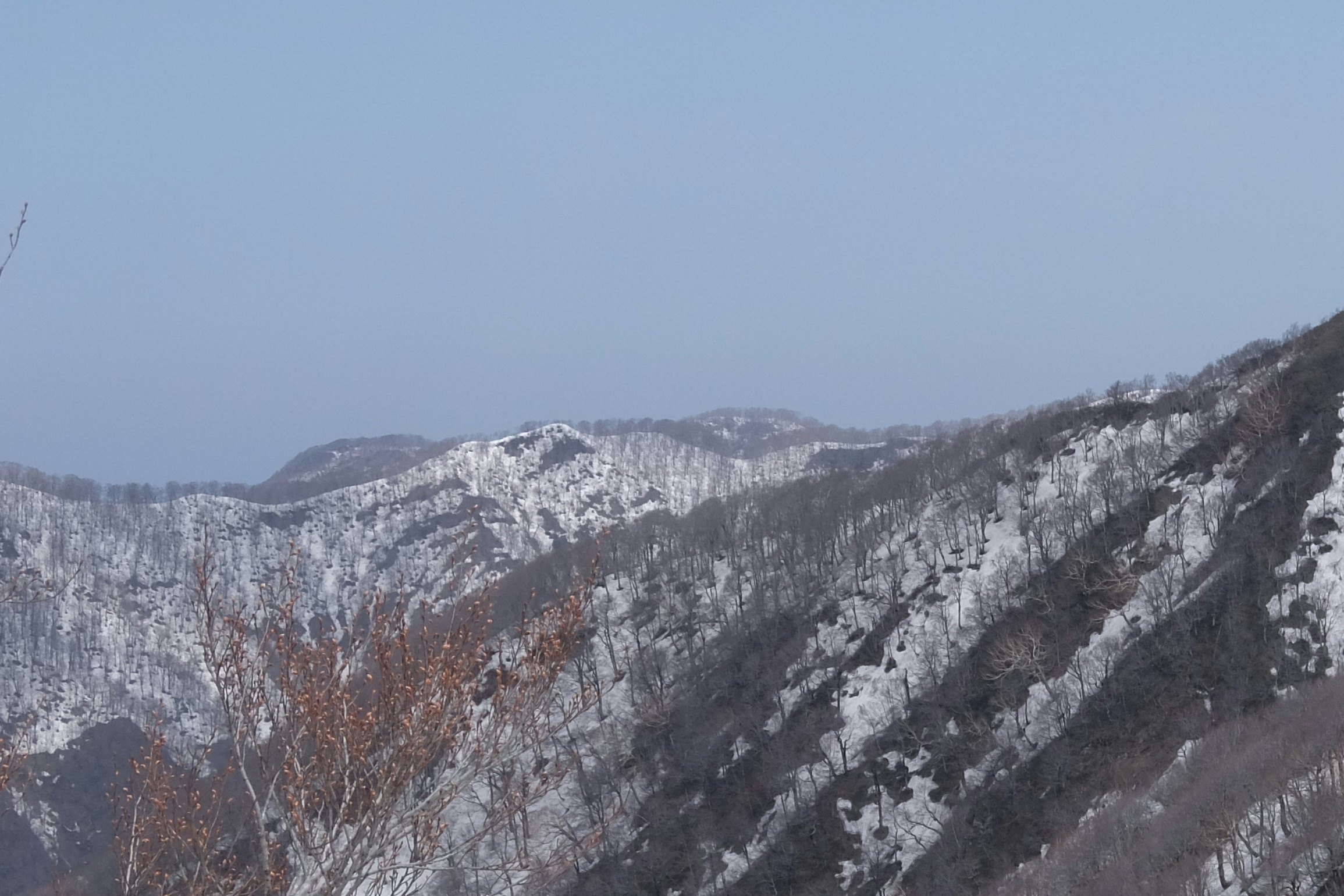 大峰岳 （白神岳登山道 蟶山コースから望む・中央の山）